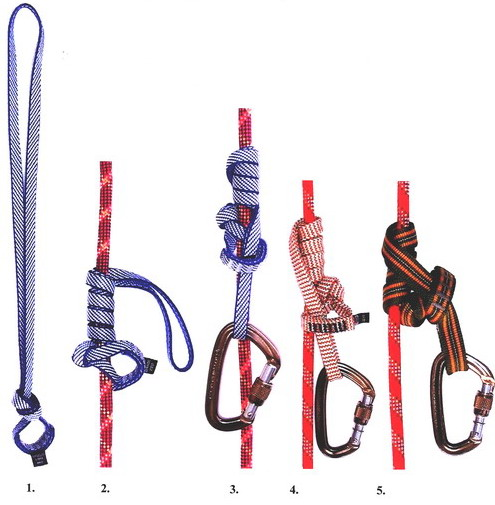 FB-Bandklemmknoten